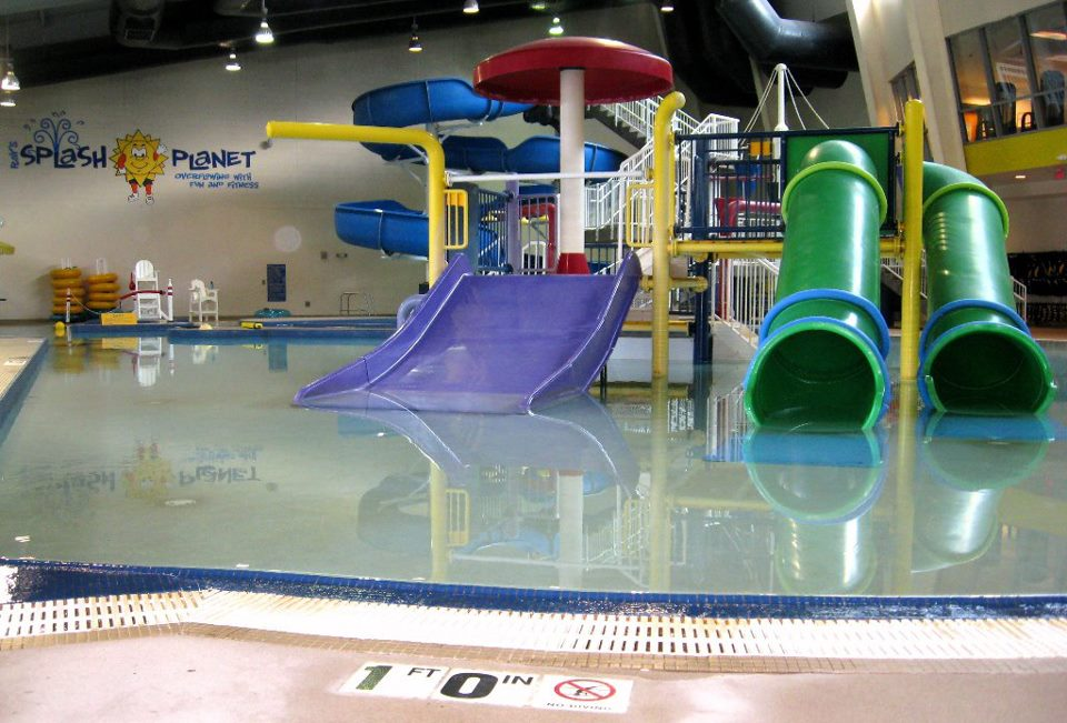 Waterpark Area of Facility .Xdmannddmd ejdjdjdjcjdkxmmxjdndjrmfejfmdmfmrkrf g